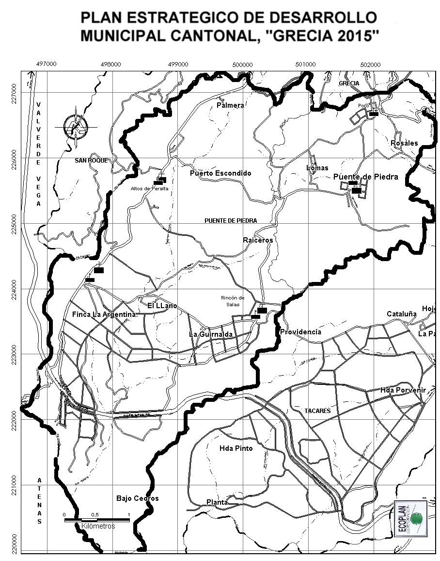 Mapa del distrito de Puente de Piedra.